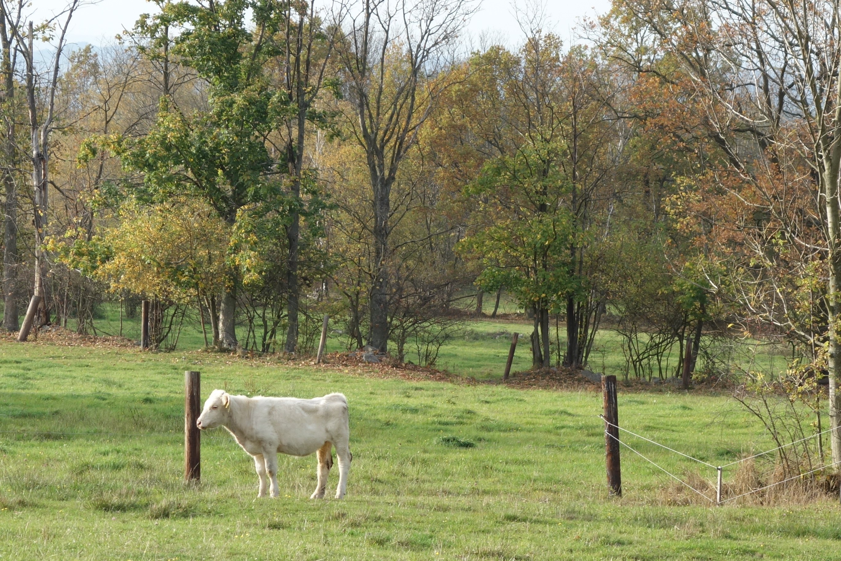 pasoucí se kráva